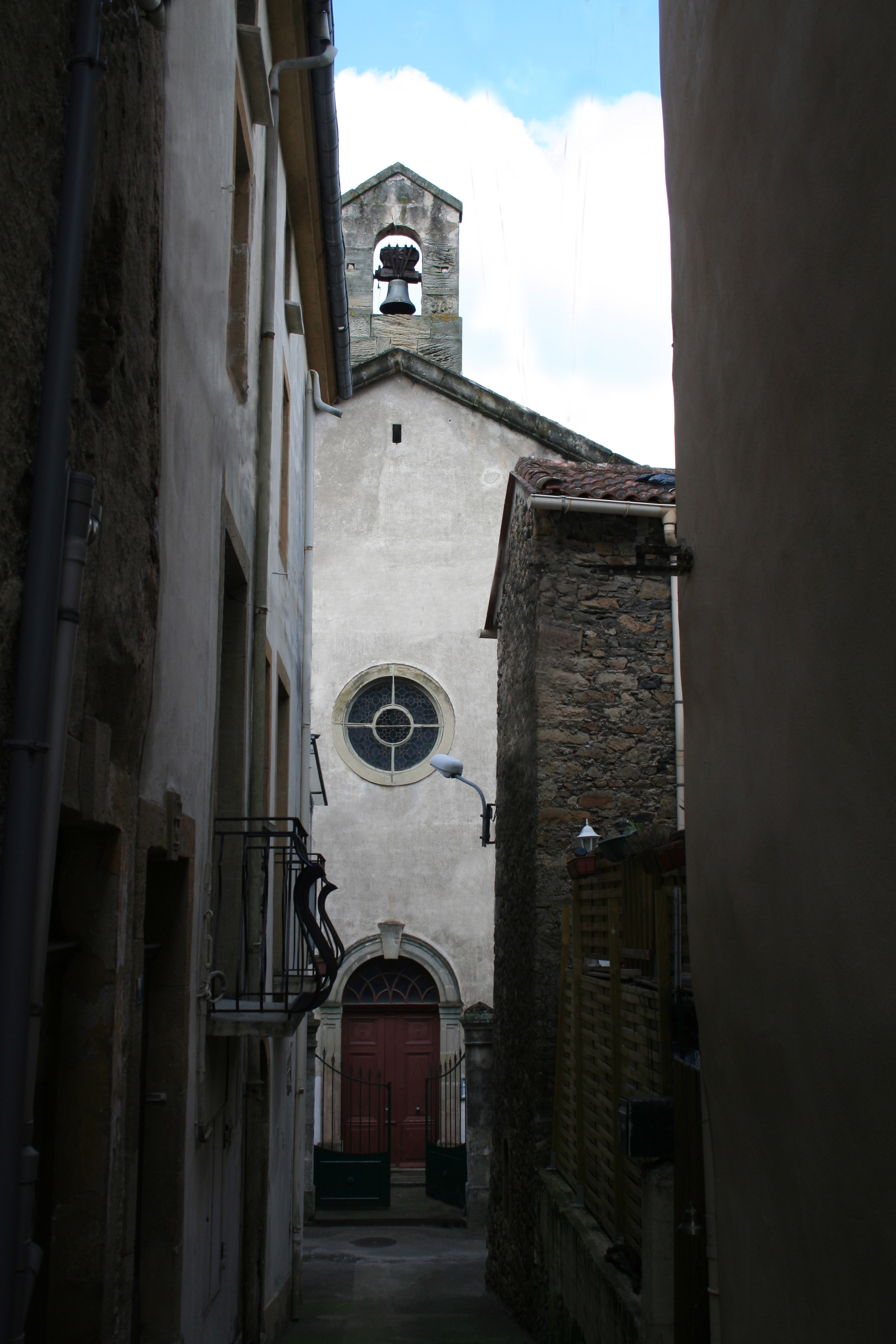 Graissessac (Hérault) - temple protestant.